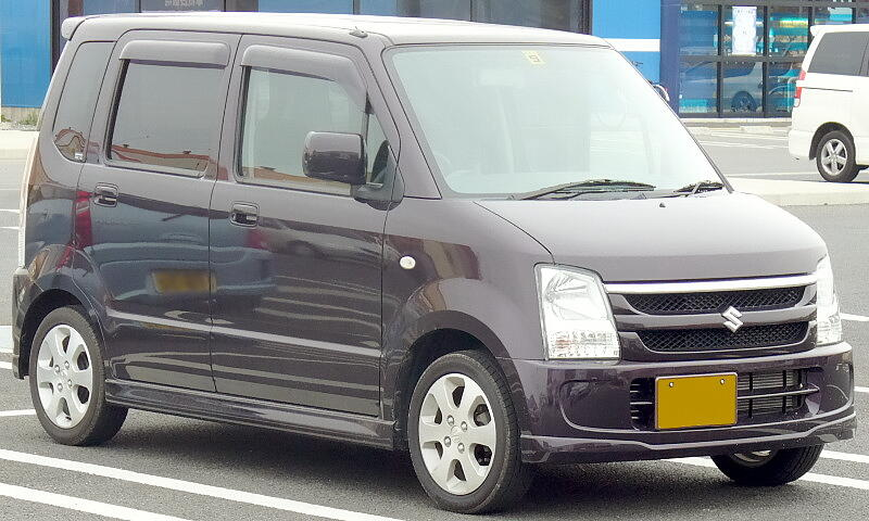 3代目スズキ・ワゴンR（後期型）